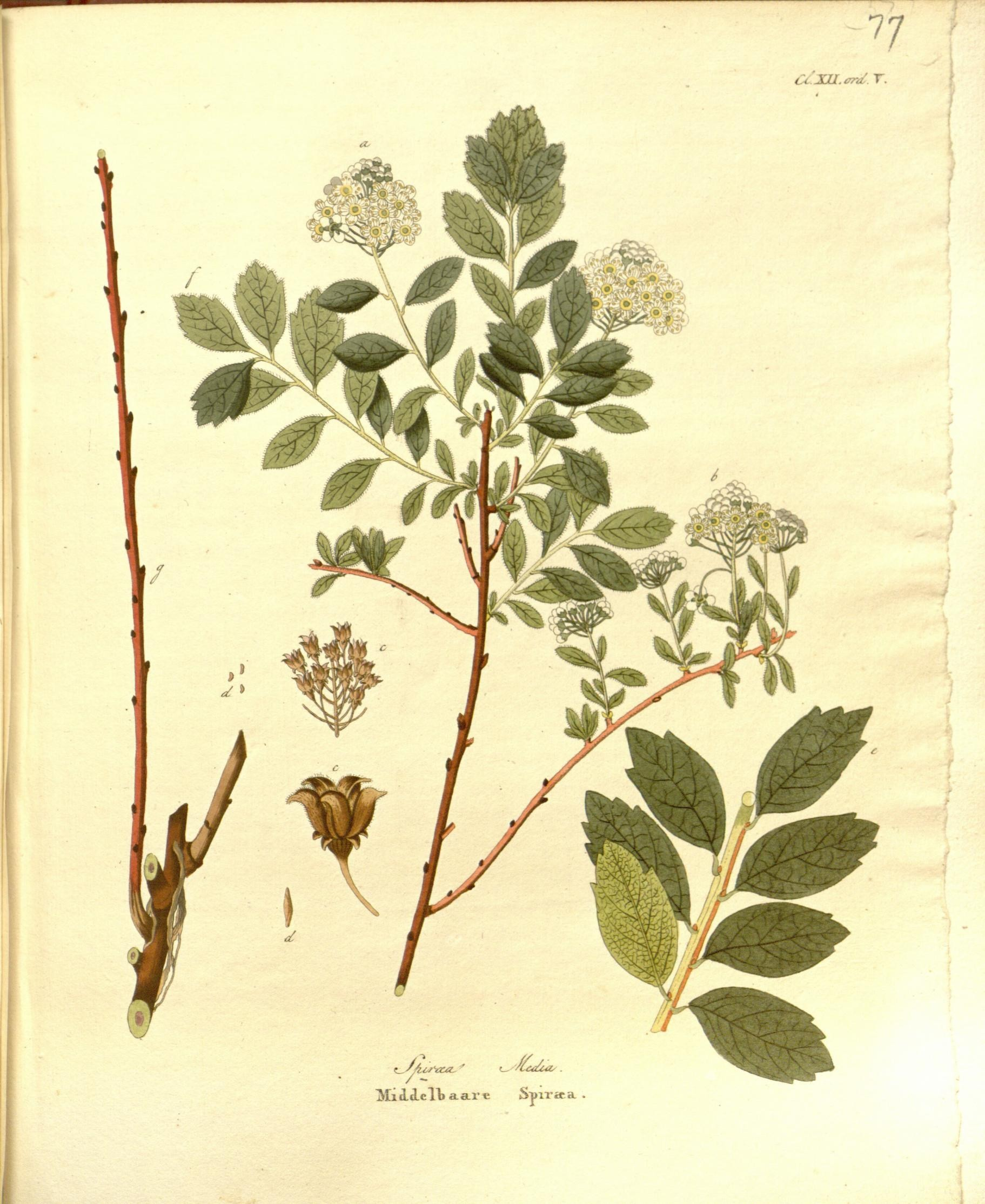 Ml -j^iL±3- -.^ - J v-rw — '^ i Cc'xu. tmi. r. ^Z' ,c _^.^;/ I t m % I 1 I ( t » I (^ ,1' (I t .■ t S \ t i • I / I J \ ^ r i iMiclcLellj a. arc Spir era 1